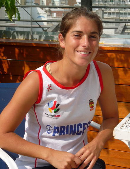 a nota Rocío Ybarra 3